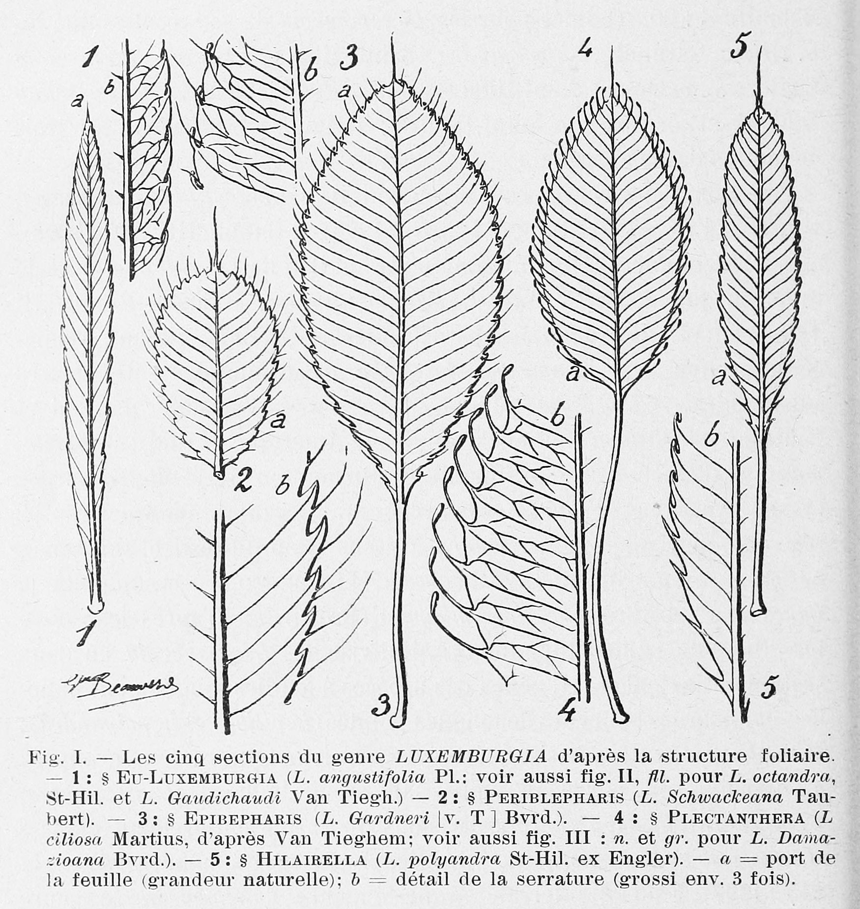 Illustrations of (1) Luxemburgia angustifolia (Ochnaceae), (2) Luxemburgia Schwackeana, (3) Luxemburgia Gardneri (= Luxemburgia glazioviana), (4) Luxemburgia ciliosa, and (5) Luxemburgia polyandra (Ochnaceae)